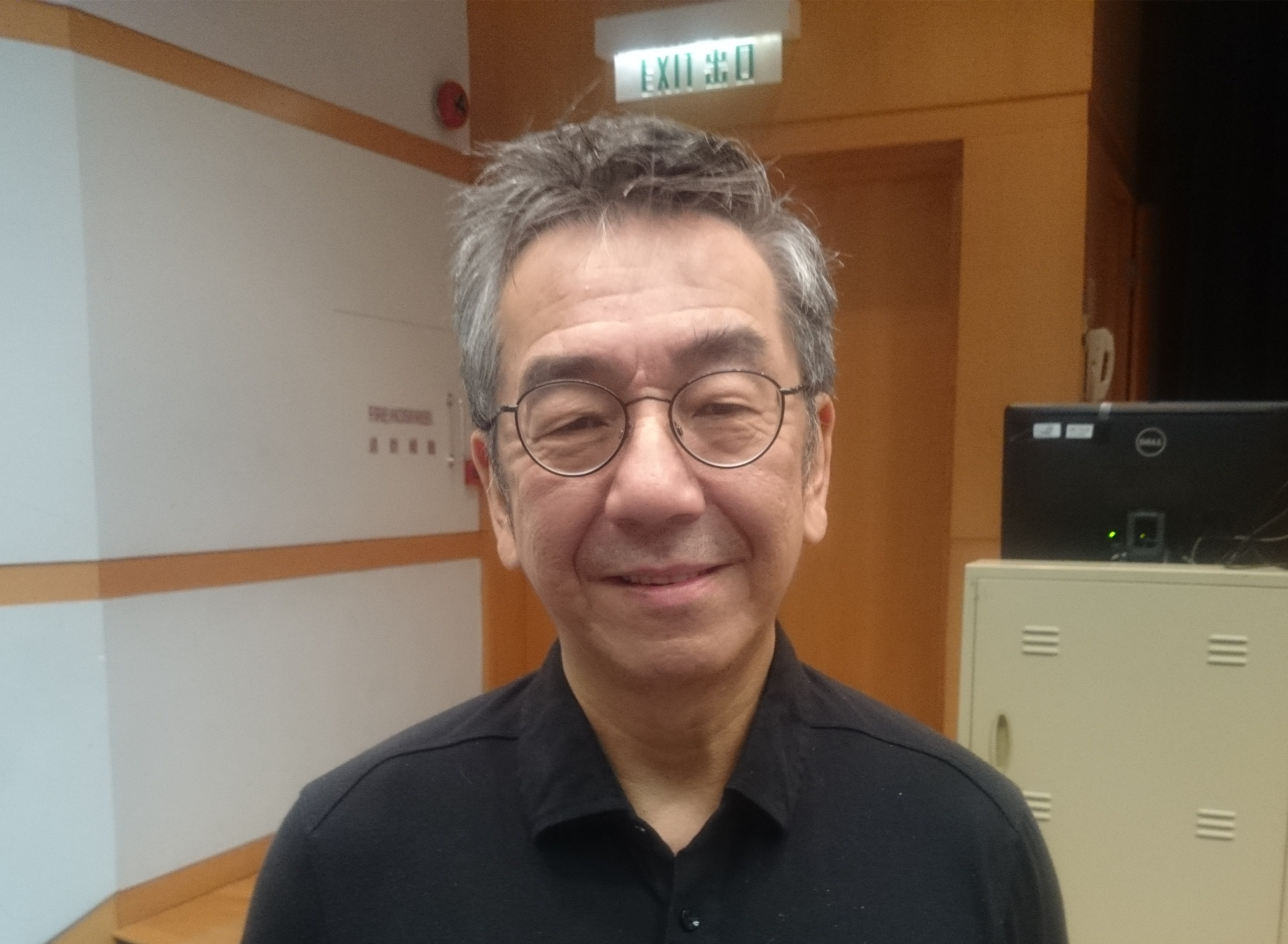 粵語: 2017年8月19號，曹捷喺香港大學嘅黃麗松講堂度。